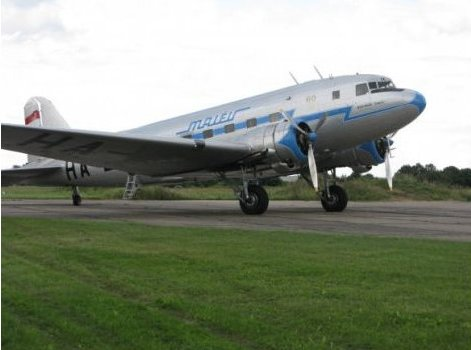 Feújított Li-2